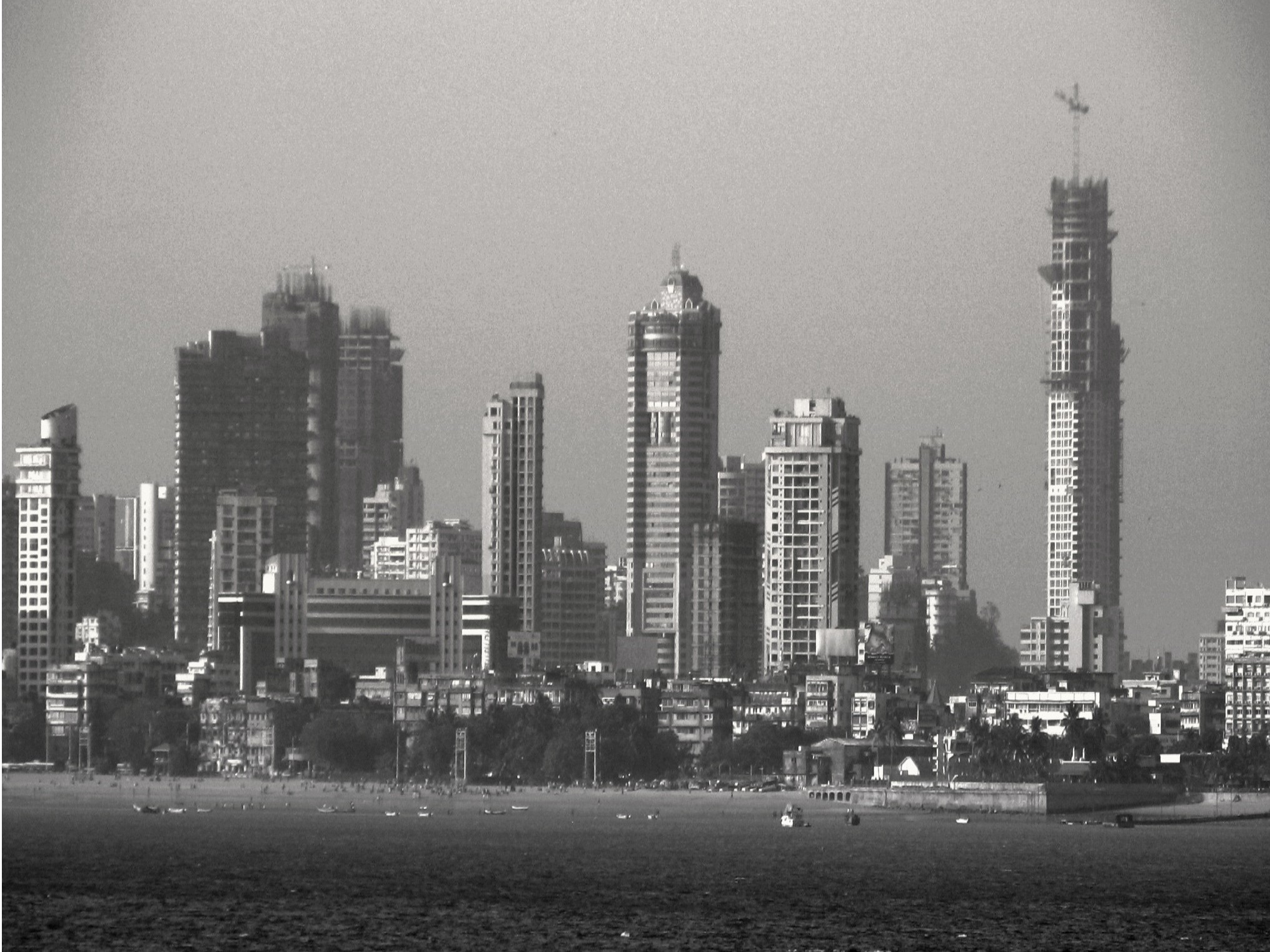 Mumbai skyline from Nariman pointNariman Point-Mumbai